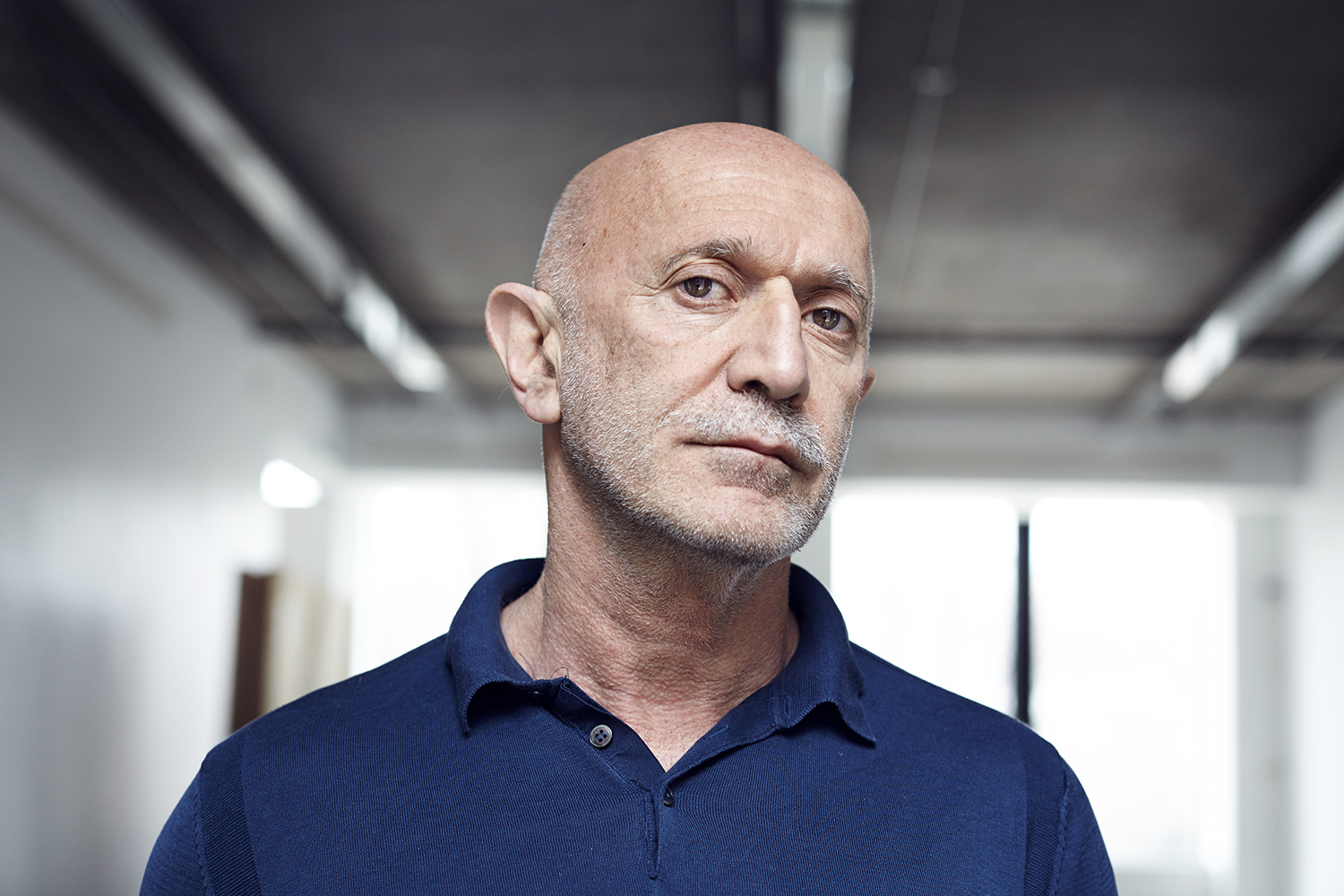 Гари Татинцян для The Art Newspaper Russia